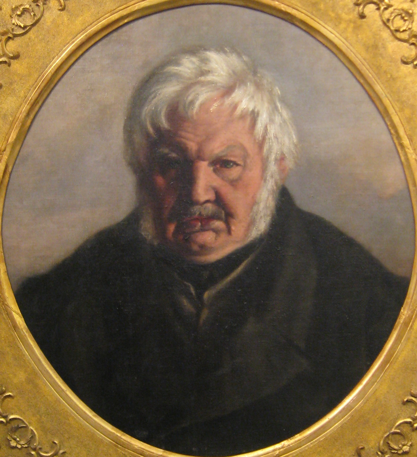 Выставка "Бородинская панорама" (2012)